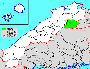 島根県仁多郡の範囲